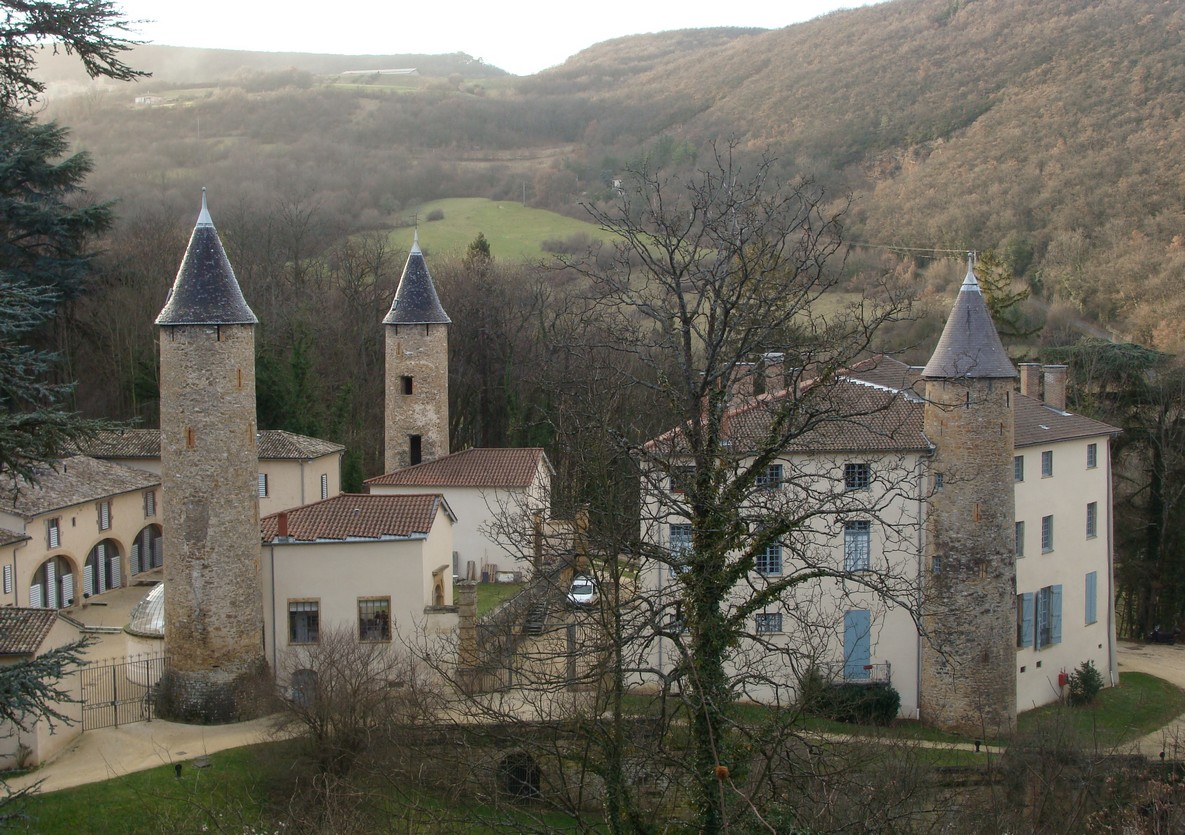 Le Château de la Trolanderie, vue d'ensemble.